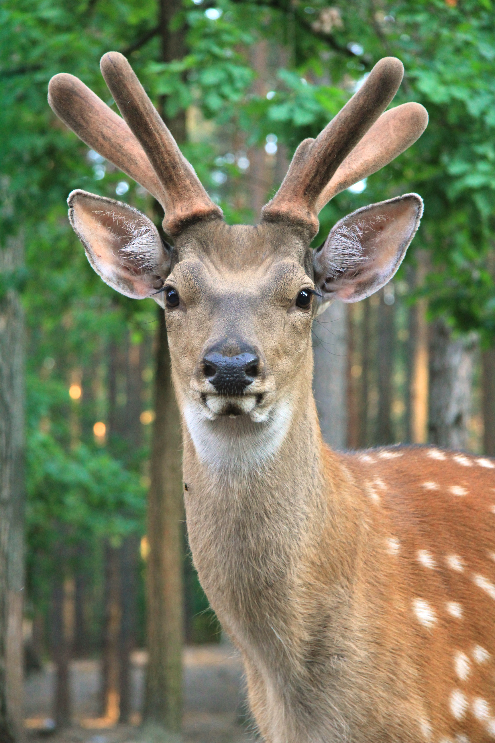 Орловское Полесье: Национальный парк расположен в центре Среднерусской возвышенности на территории Знаменского и Хотынецкого районов Орловской области,Знаменский район, Орловская область This image is related to the protected area of Russia number 5700037